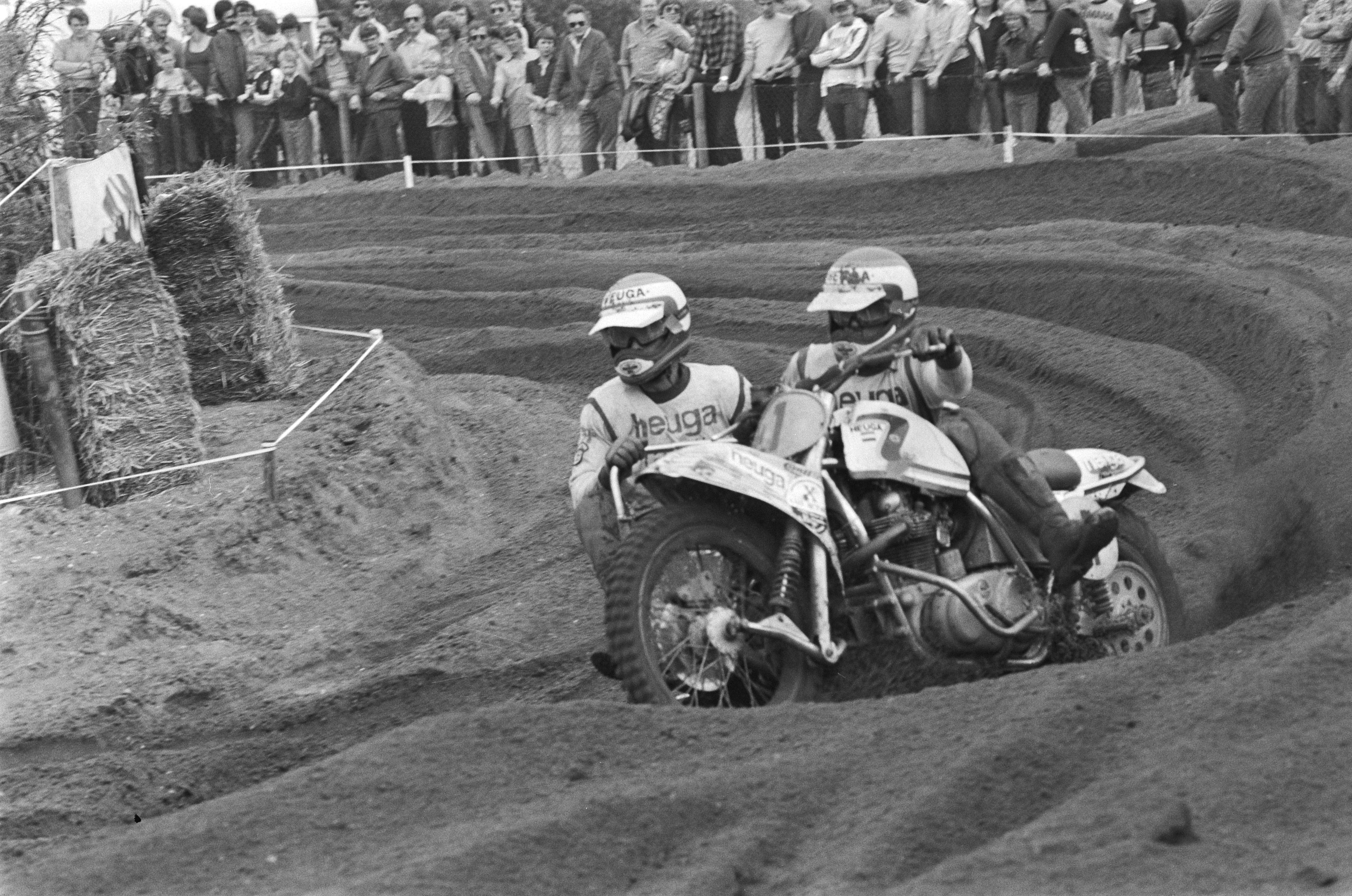 Collectie / Archief : Fotocollectie Anefo Reportage / Serie : Finale Nederlandse kampioenschap zijspanmotorcross in Amsterdam, circuit Havens-west Beschrijving : Ton van Heugten, F. Kiggen Datum : 28 september 1980 Locatie : Amsterdam, Noord-Holland Trefwoorden : motorcross, sport, zijspanmotoren Persoonsnaam : Kiggen, F., Heugten, Ton van Fotograaf : Pereira, Fernando / Anefo Auteursrechthebbende : Nationaal Archief Materiaalsoort : Negatief (zwart/wit) Nummer archiefinventaris : bekijk toegang 2.24.01.05 Bestanddeelnummer : 931-0444